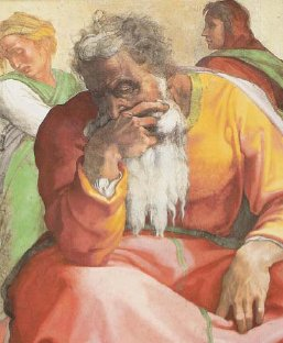 Detalle del profeta Jeremías. Bóveda de la Capilla Sixtina. Museos Vaticanos. Roma (Italia).